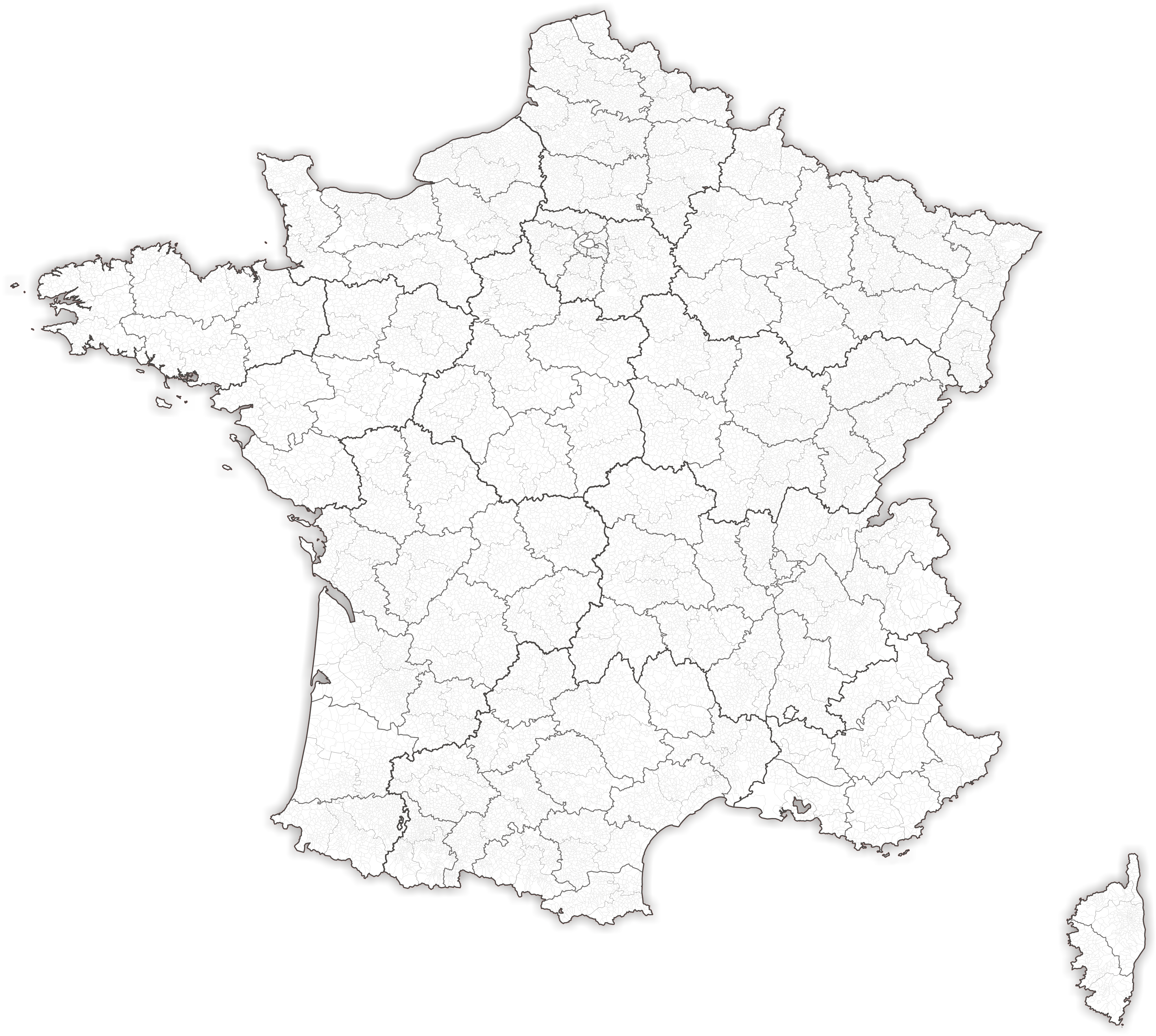 Gemeinden Frankreichs Stand 2018